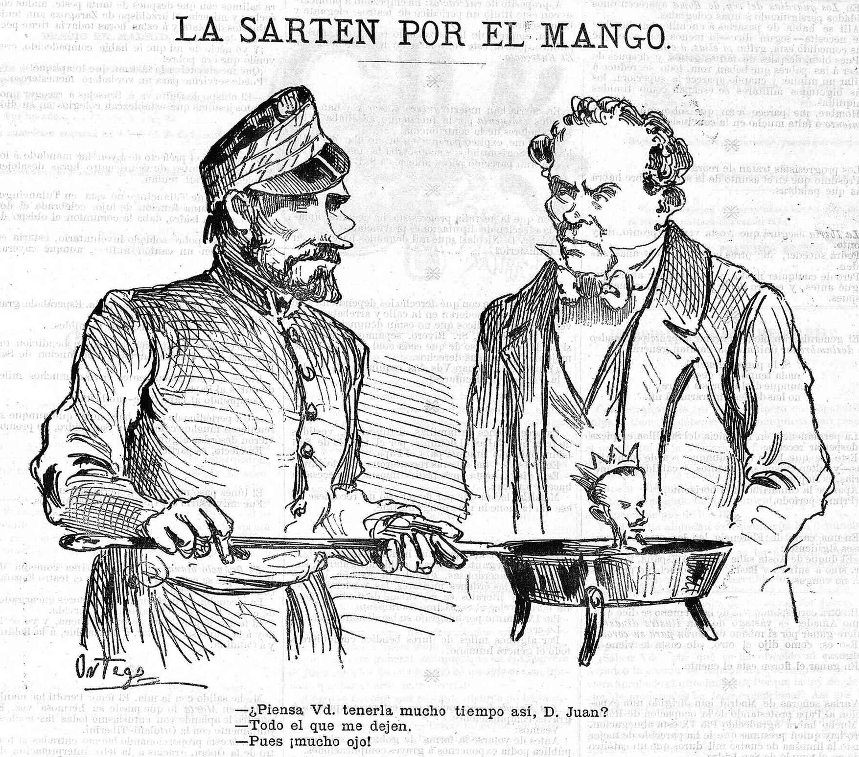 La sartén por el mango, en la revista satírica española Gil Blas.